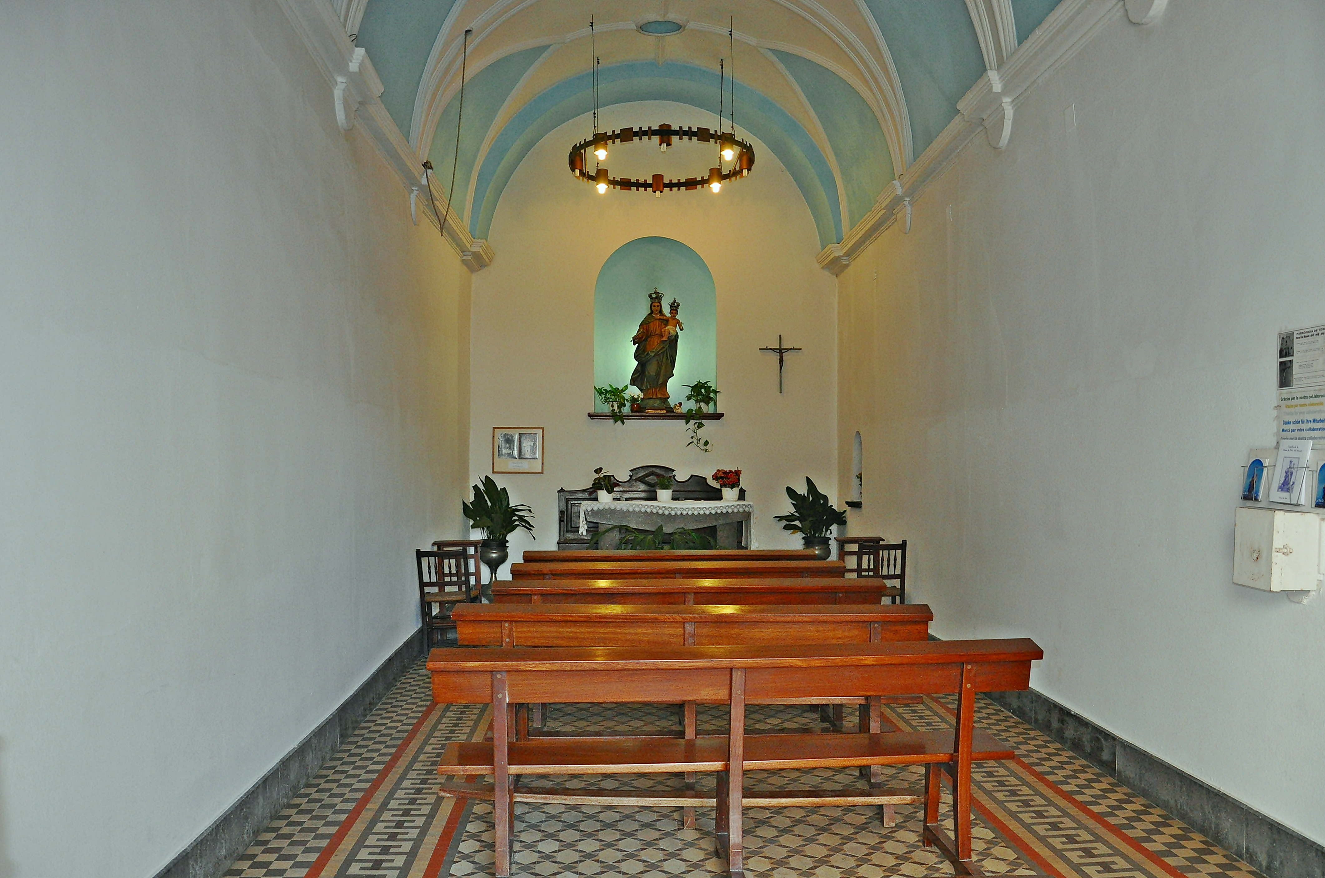 la selva-cataluña